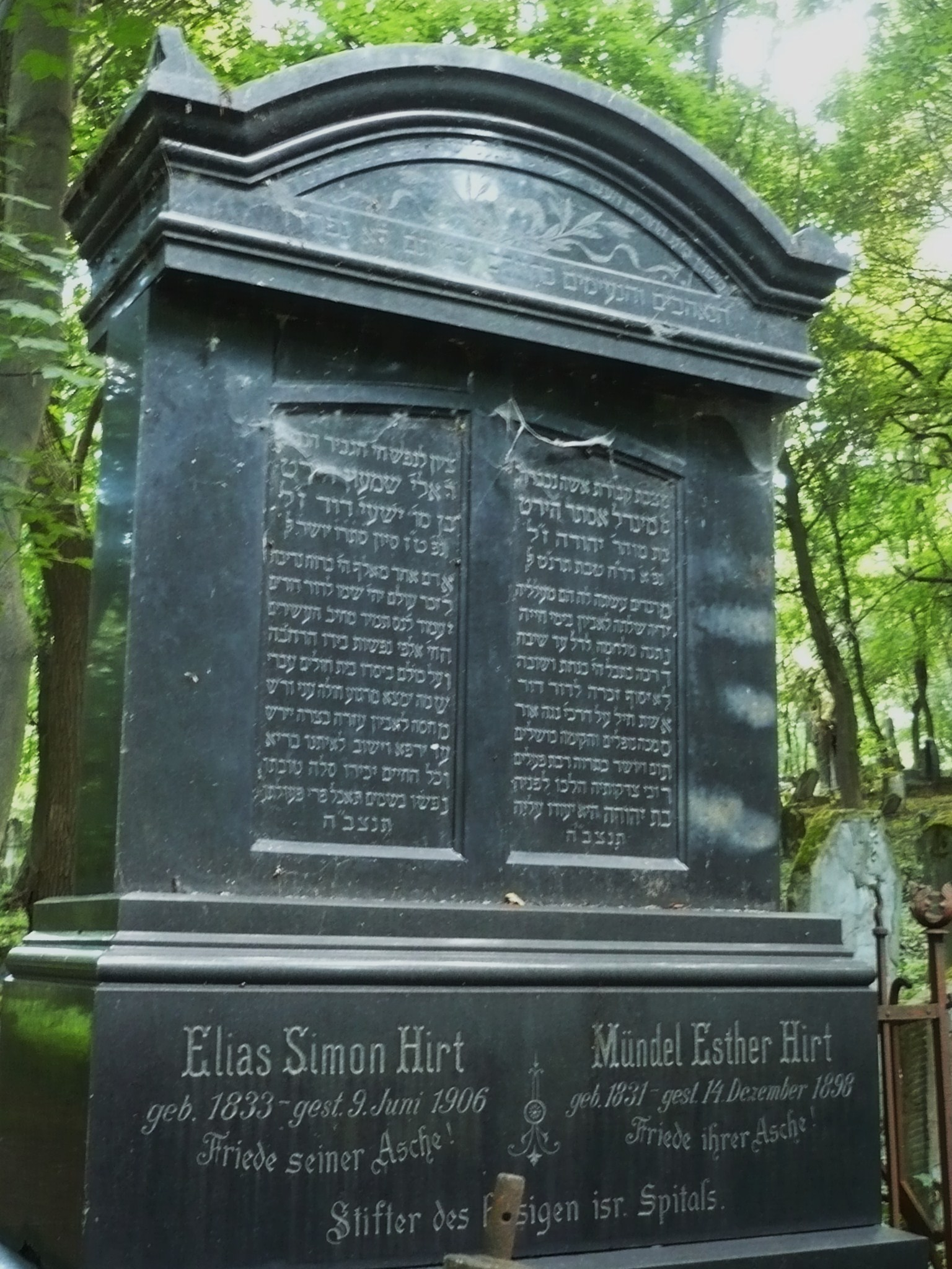 Przemyśl, nowy cmentarz żydowski